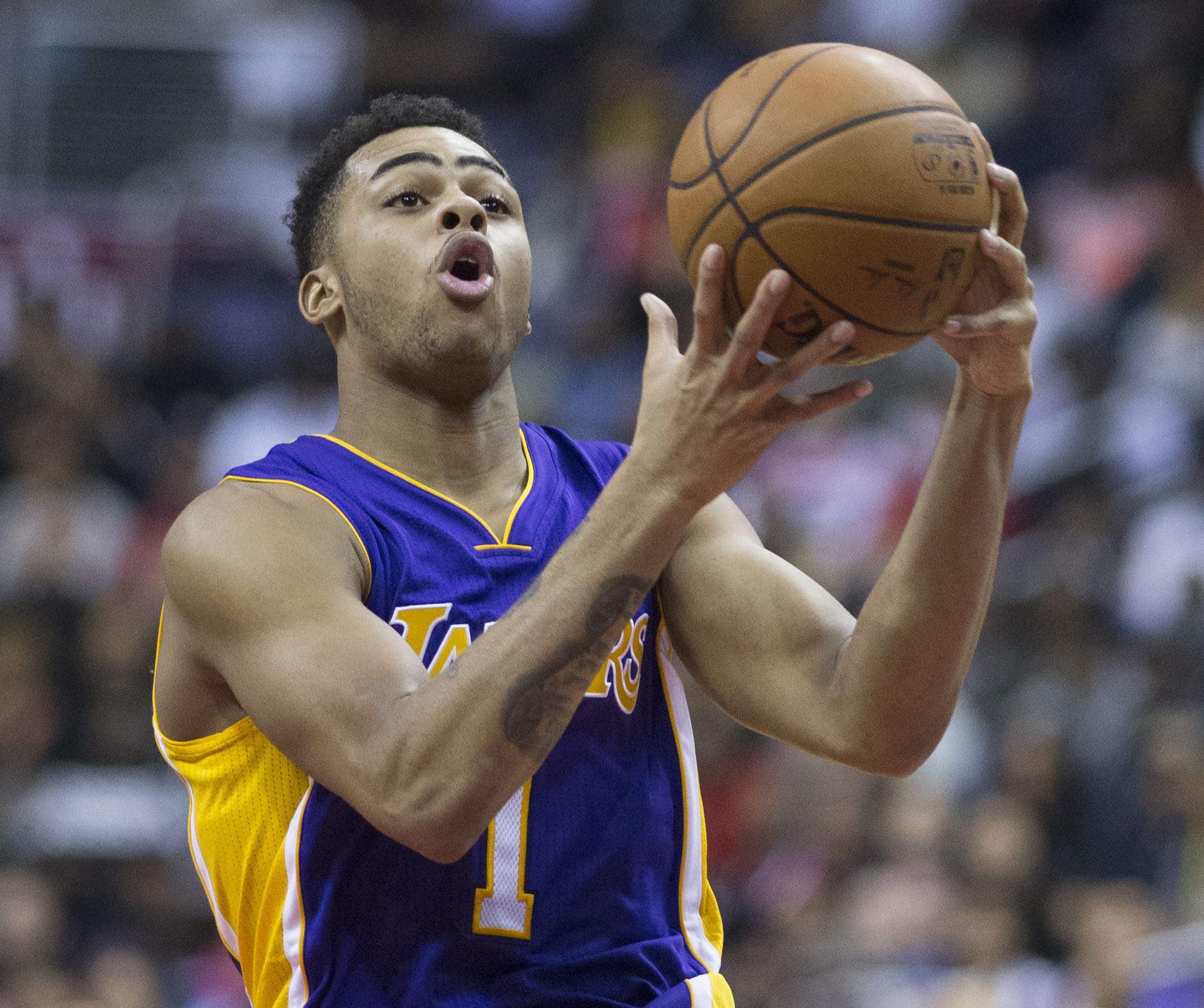 D'Angelo Russell of Los Angeles Lakers